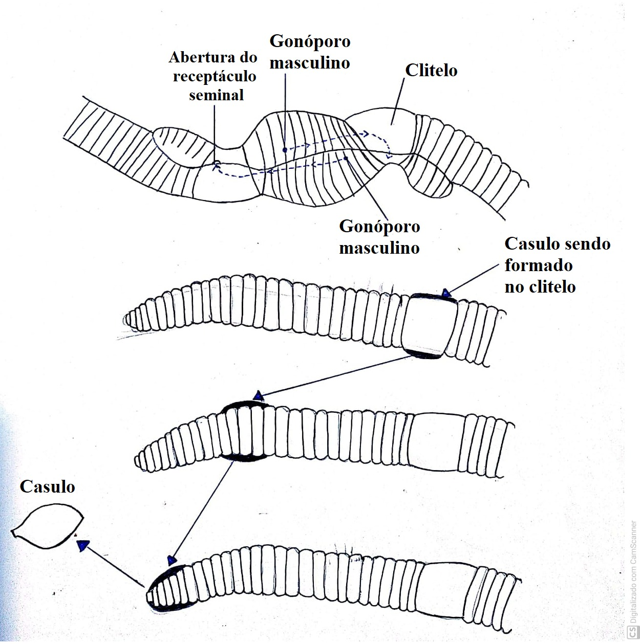 A imagem descreve visualmente o passo a passo da reprodução de Oligoquetas. Desde a interação entre as minhocas até a formação do casulo.